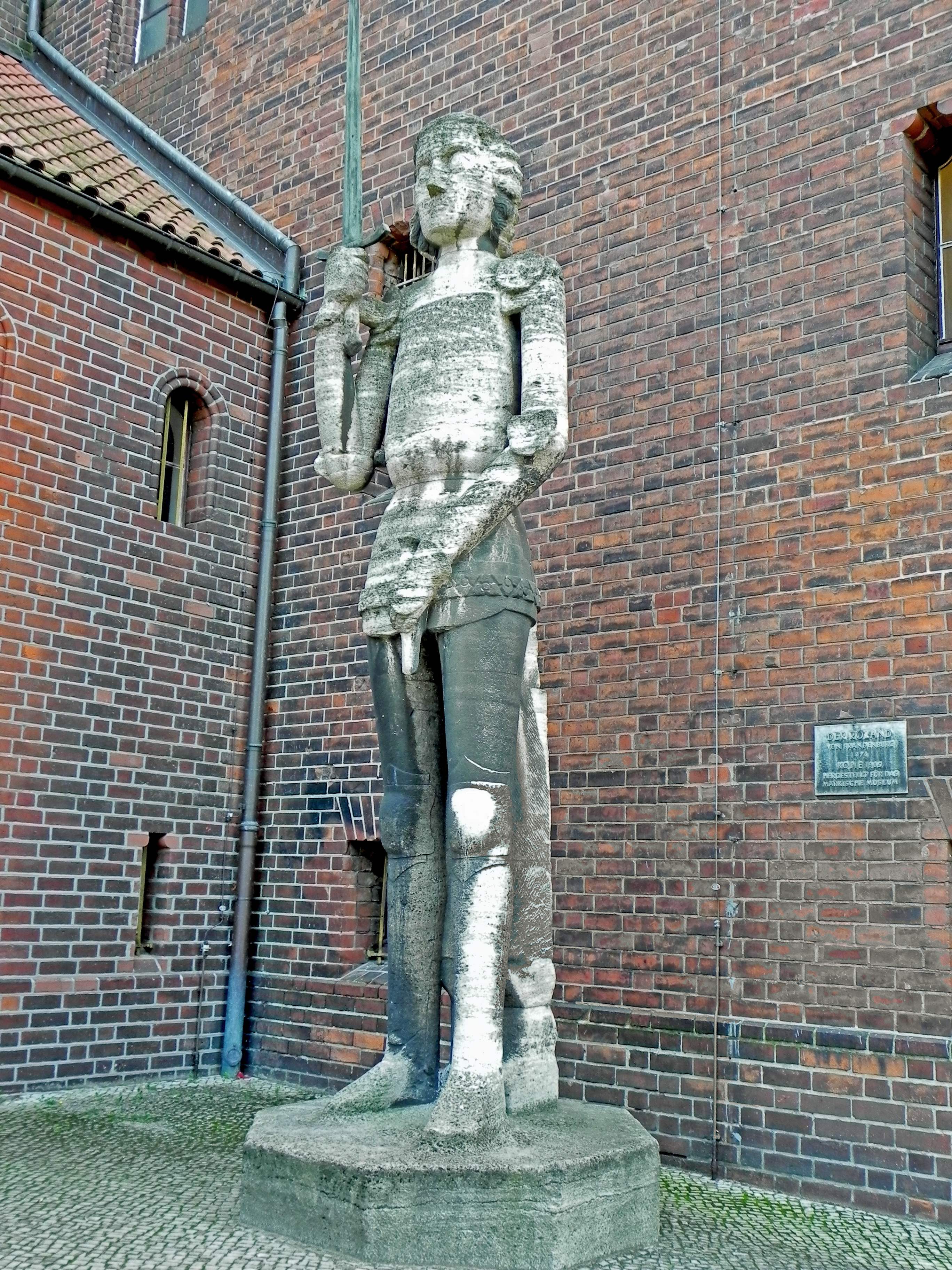 Kopie des "Roland von Brandenburg", der 1474 auf dem Marktplatz der Neustadt von Brandenburg an der Havel aufgestellt wurde. 1905 fuer das Maerkische Museum Berlin hergestellt und vor dessen Eingangsportal aufgestellt.